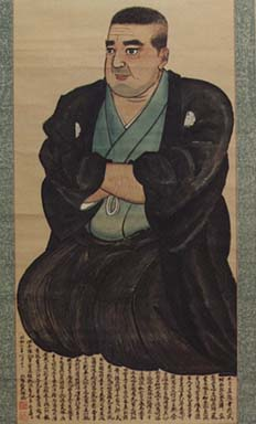 西郷隆盛肖像画